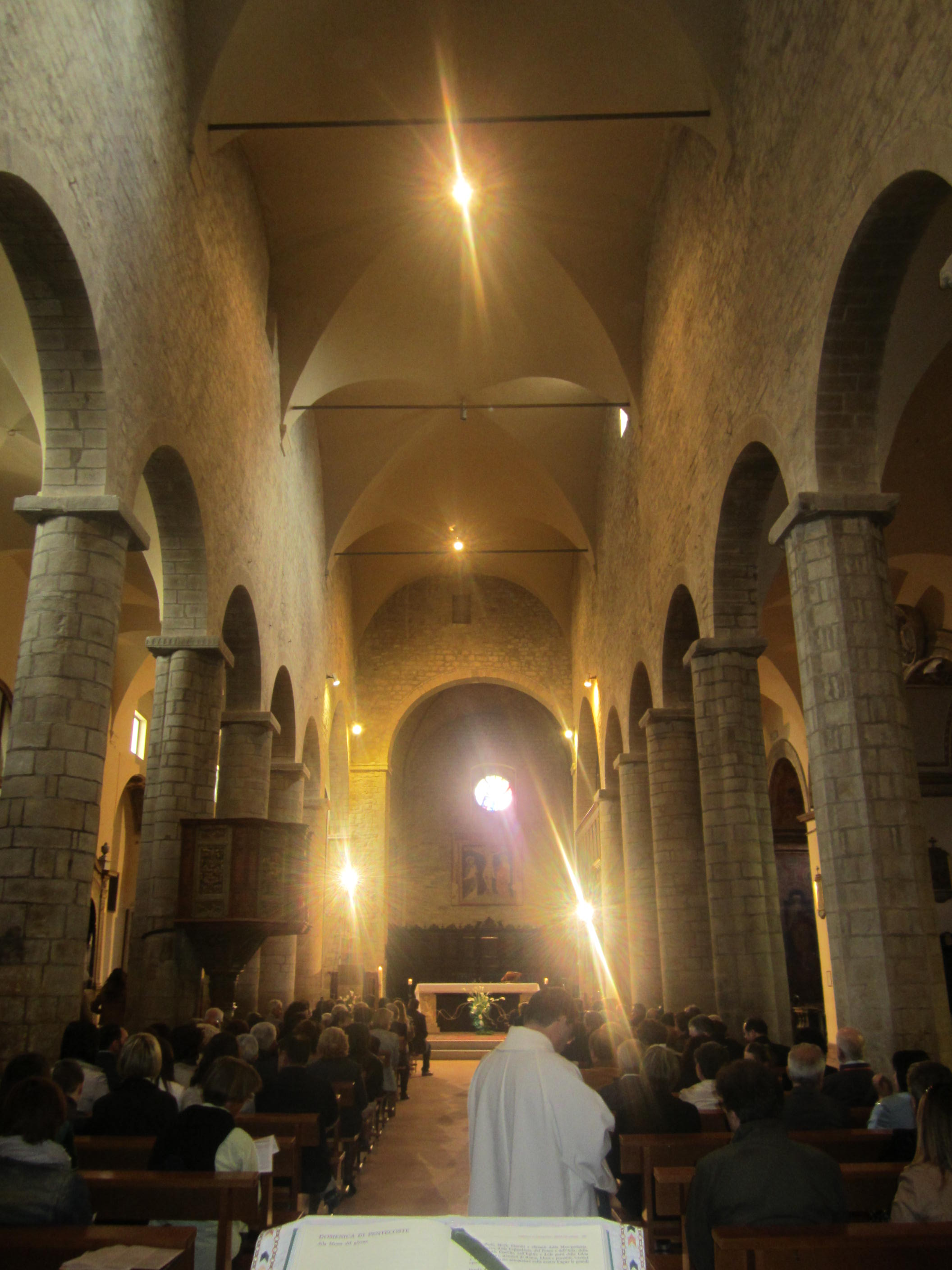 Interno della Collegiata a San Ginesio (MC)